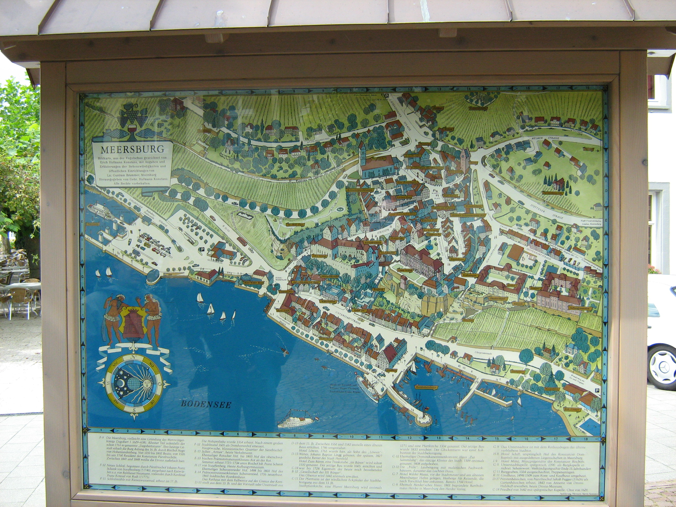 Meersburg (Schild)